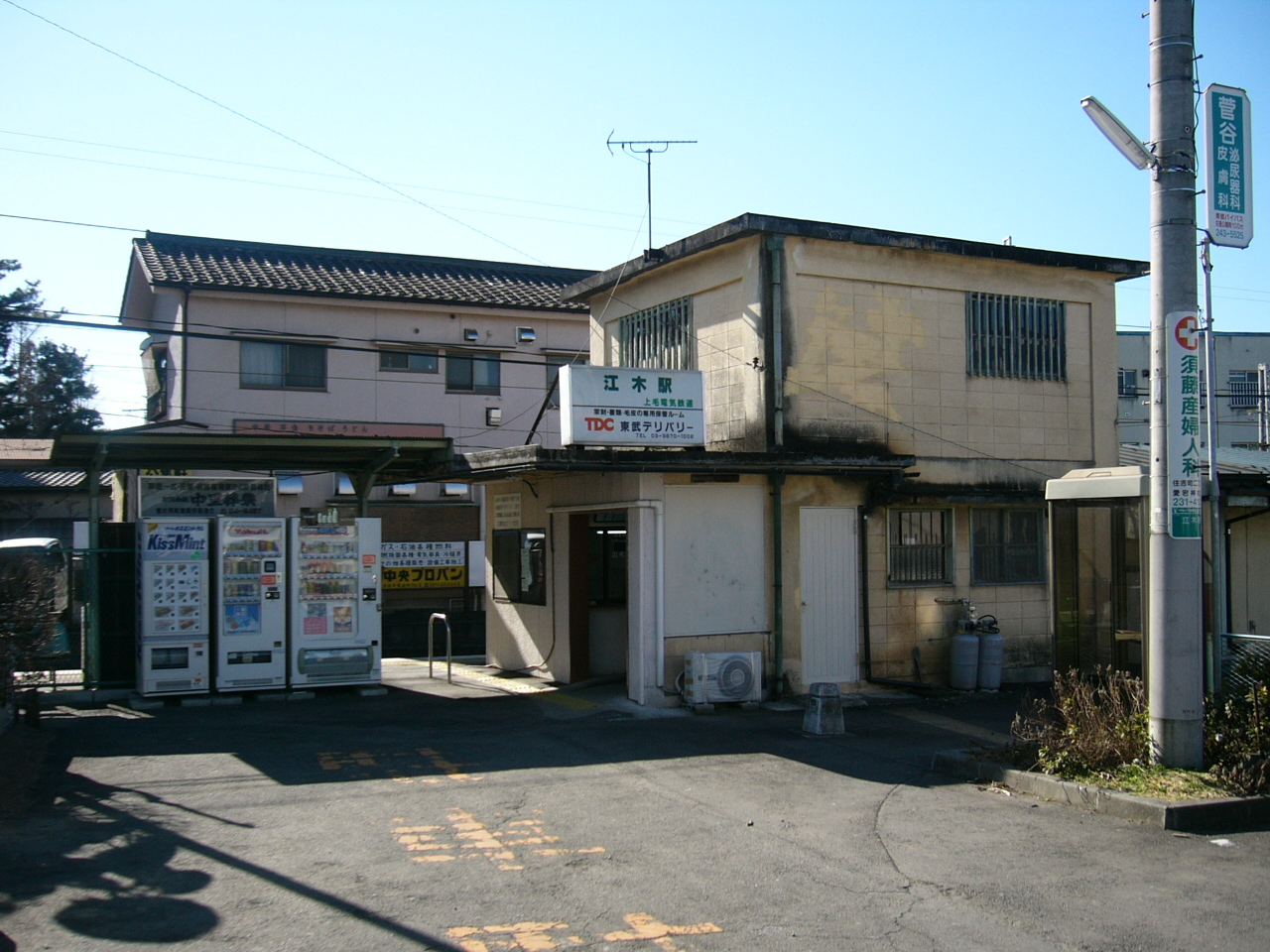 Egi Station